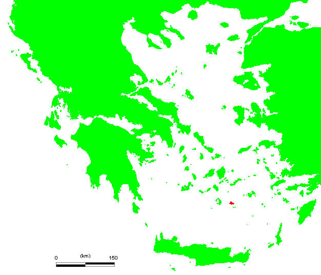 GR Anafi.PNG (Greek island)